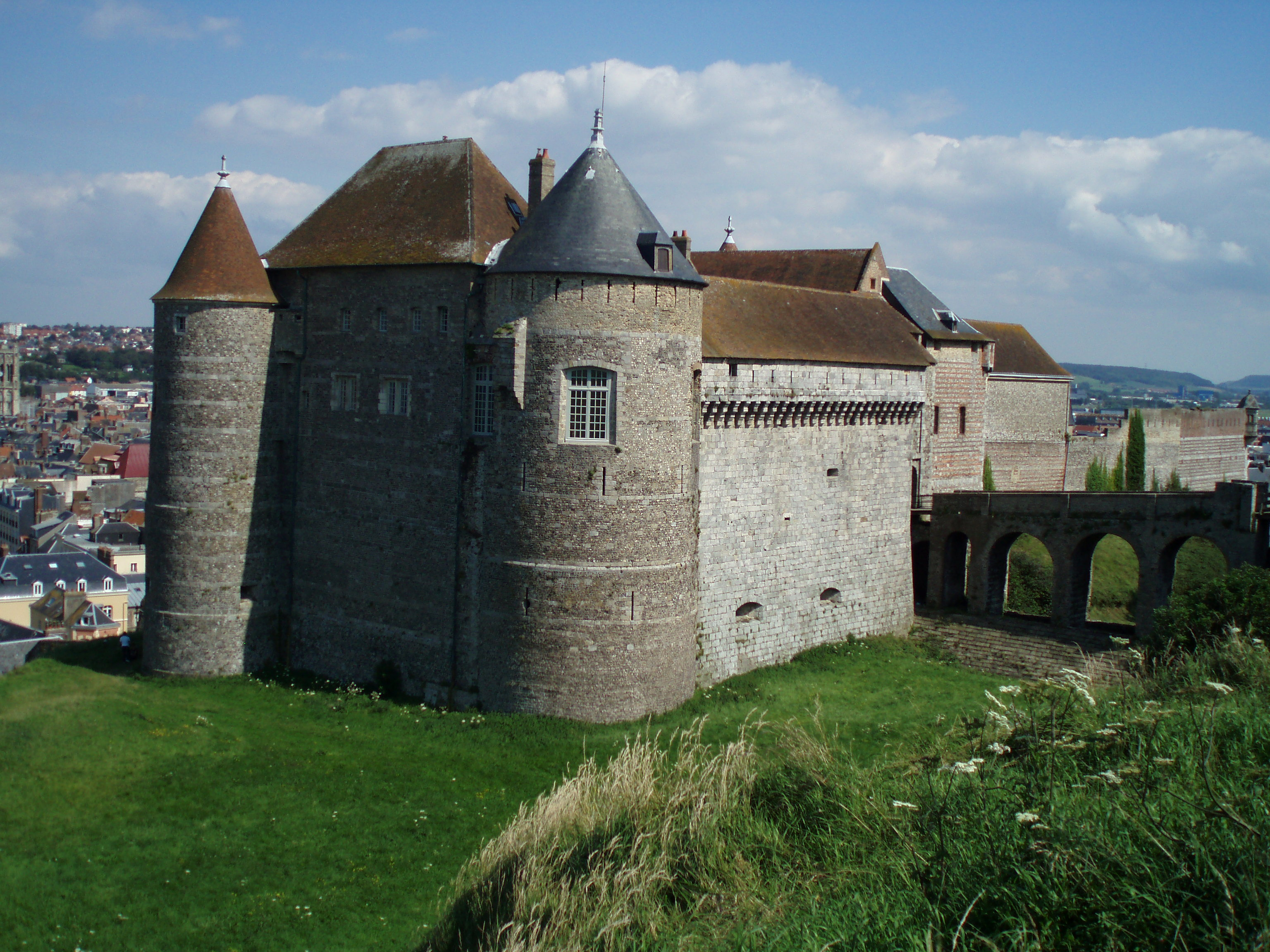 Chateau de Dieppe (France)